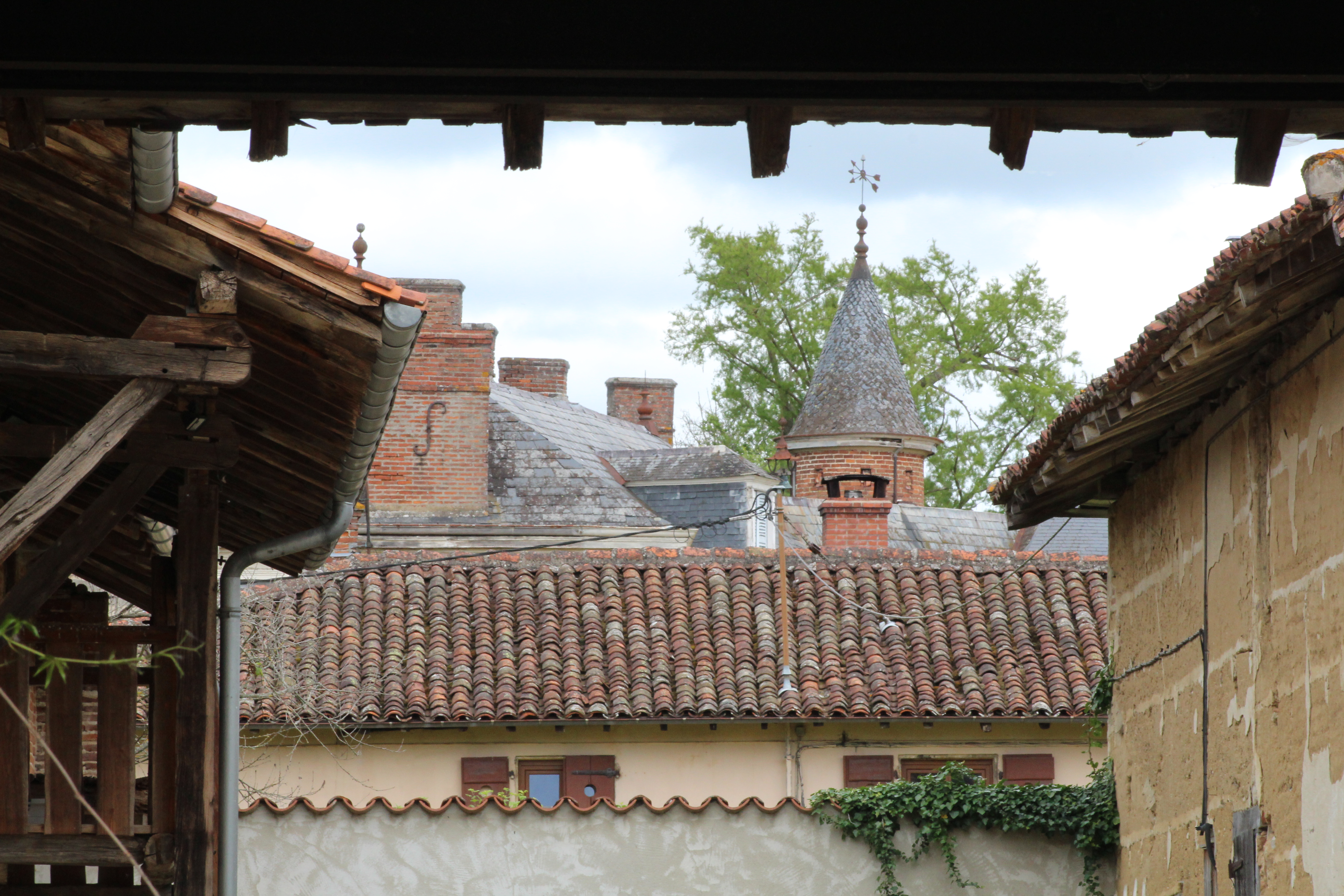 Domaine de Béost, Vonnas.